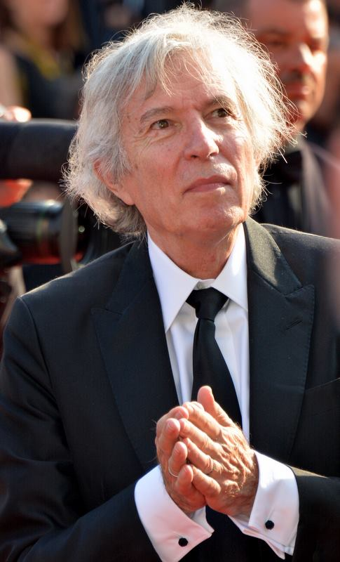 Jacques Doillon au festival de Cannes